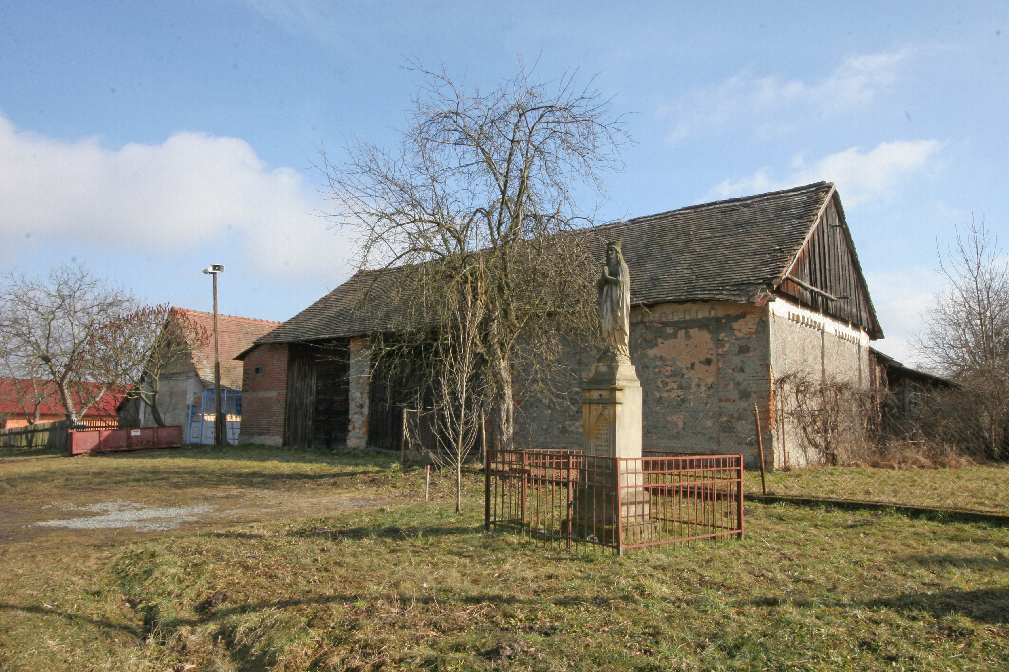 Česky: Žižkovec čp. 3